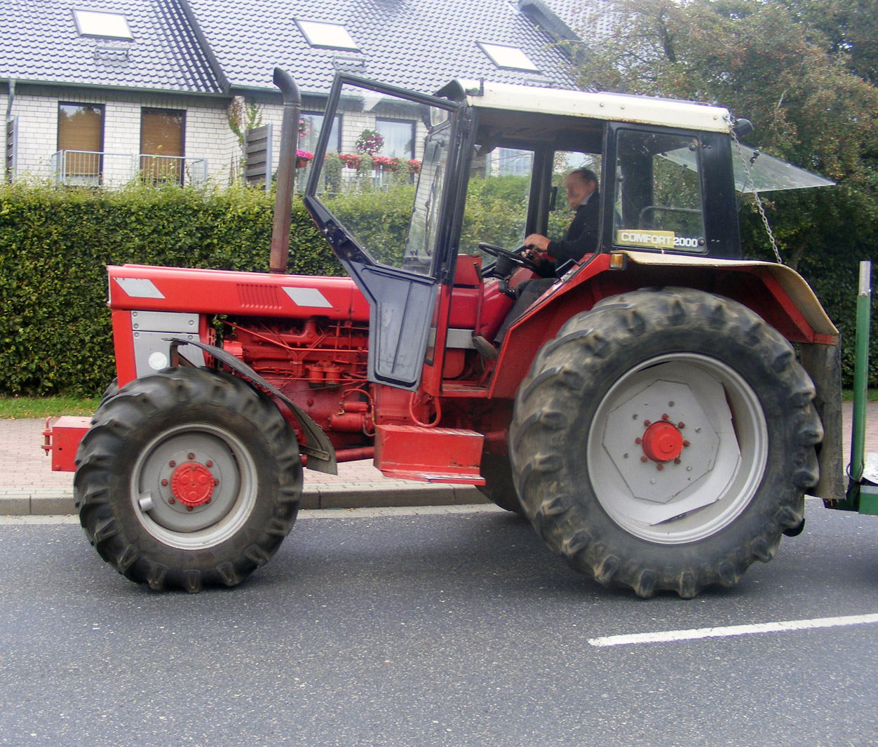 Case-IH-Traktor (IHC-Modell; 6-Zylinder-Turbodieselmotor, 180 PS, ca. 25 Jahre alt) mit Comfort-2000-Kabine